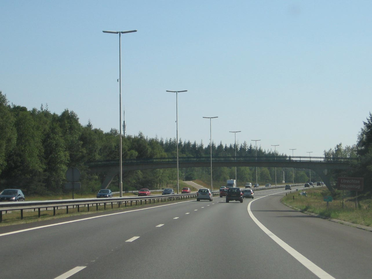 A27 Hilversum-Utrecht net na de oprit Hilversum, juni 2006. Bord Utrechtse Heuvelrug.